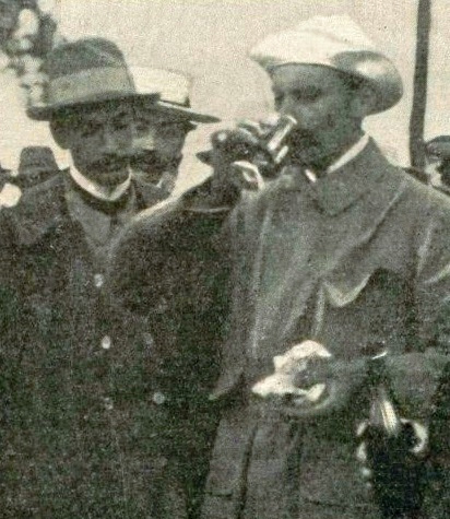 Levegh (buvant) vainqueur du Paris-Toulouse-Paris 1900, sur Mors (à sa droite le comte Gaston de Chasseloup-Laubat) - La Vie au Grand Air n°99, 4 août 1900 p.605 (photo P.Doyé)